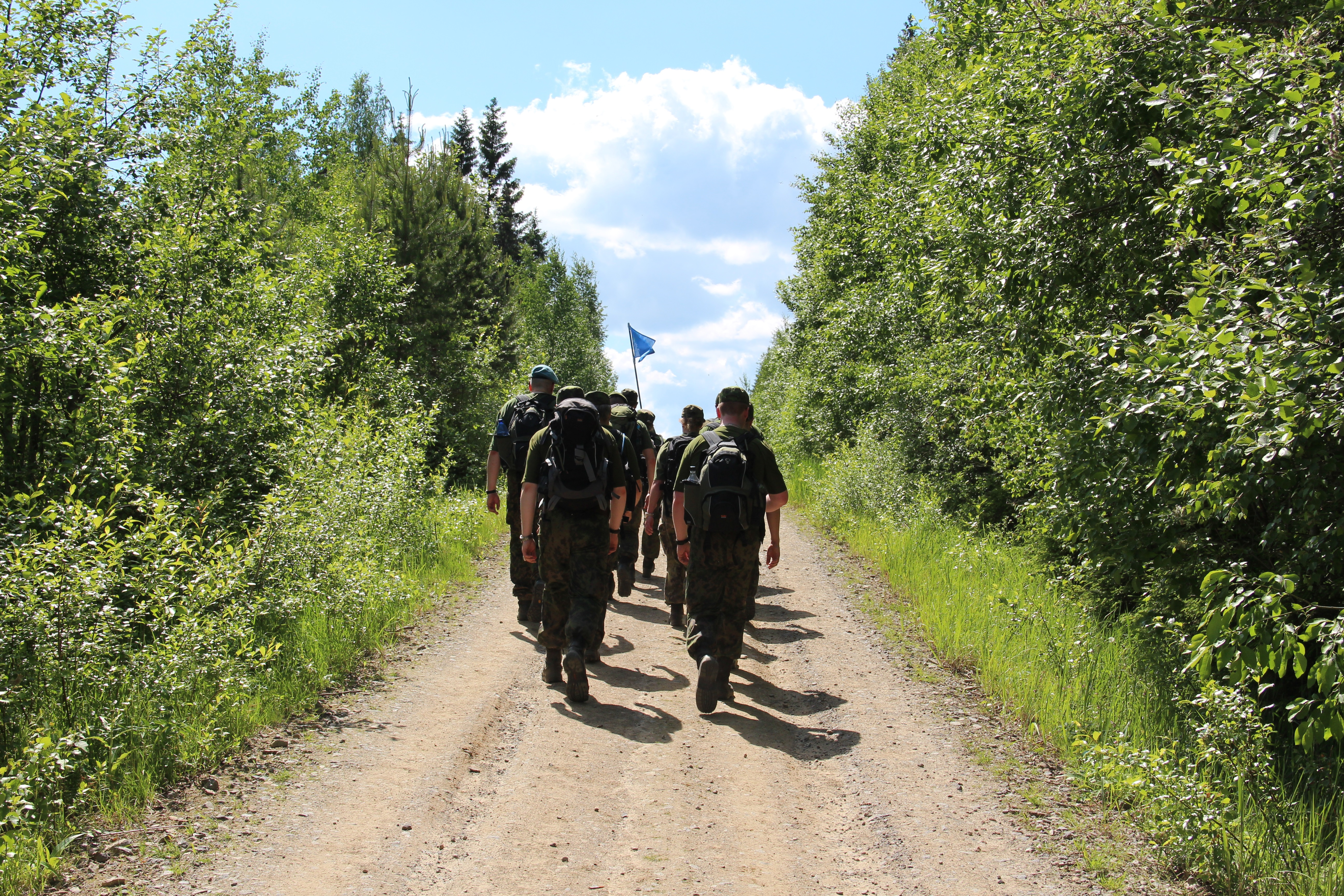 kuva Pekka Tuunanen